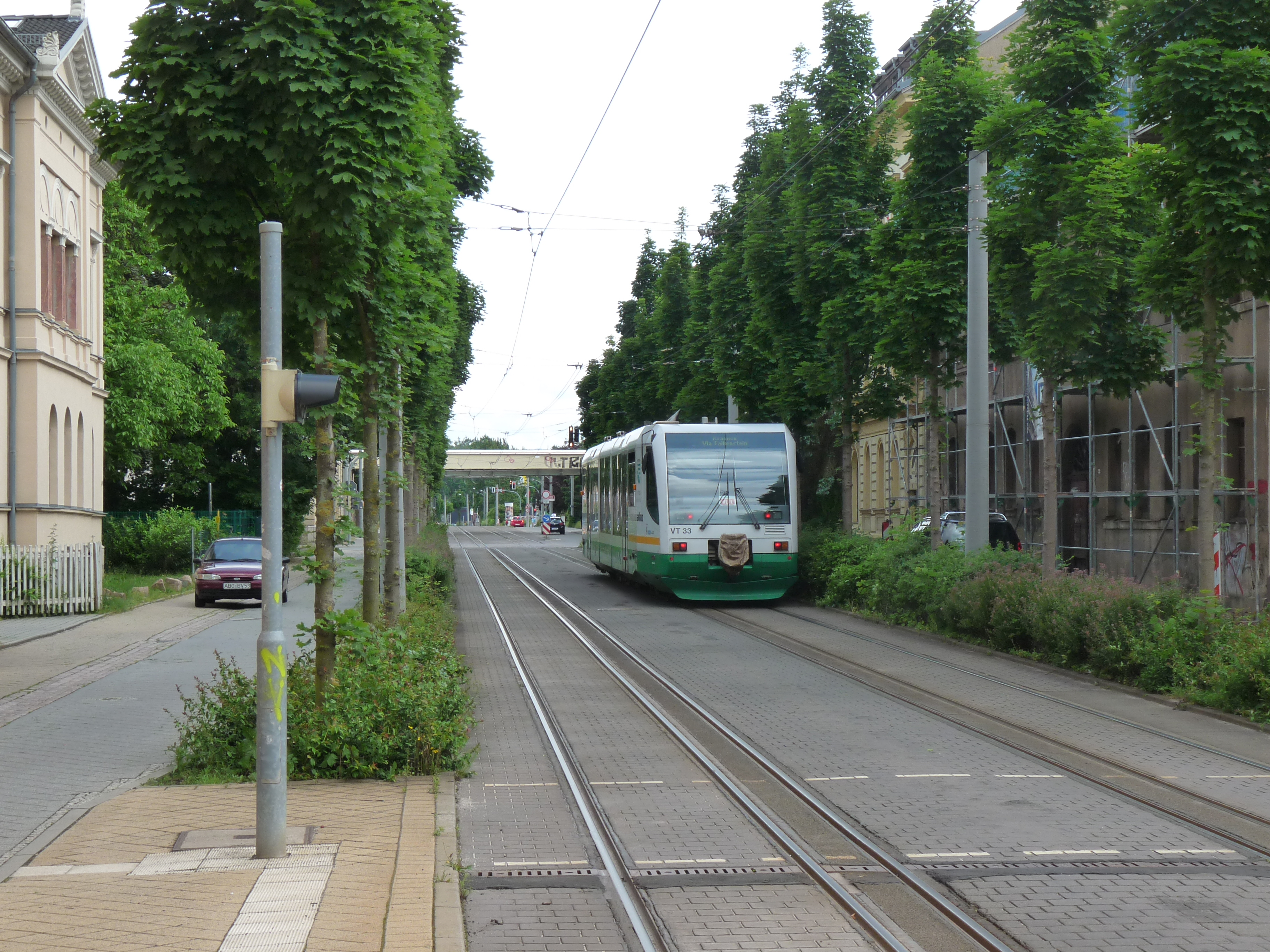 ein Triebwagenzug der Baureihe VT 33 (also als Verbrennungs-Triebwagen oder genauer als Diesel-Triebwagen ausgeführt), im Dienst der Vogtlandbahn auf dem Dreischienengleis-Abschnitt in der äußeren Schneeberger Straße auf Fahrt von Zwickau Zentrum nach Kraslice über Falkenstein; Nachschuss (also von Hinten aufgenommen), nachmittags (um 16:05)